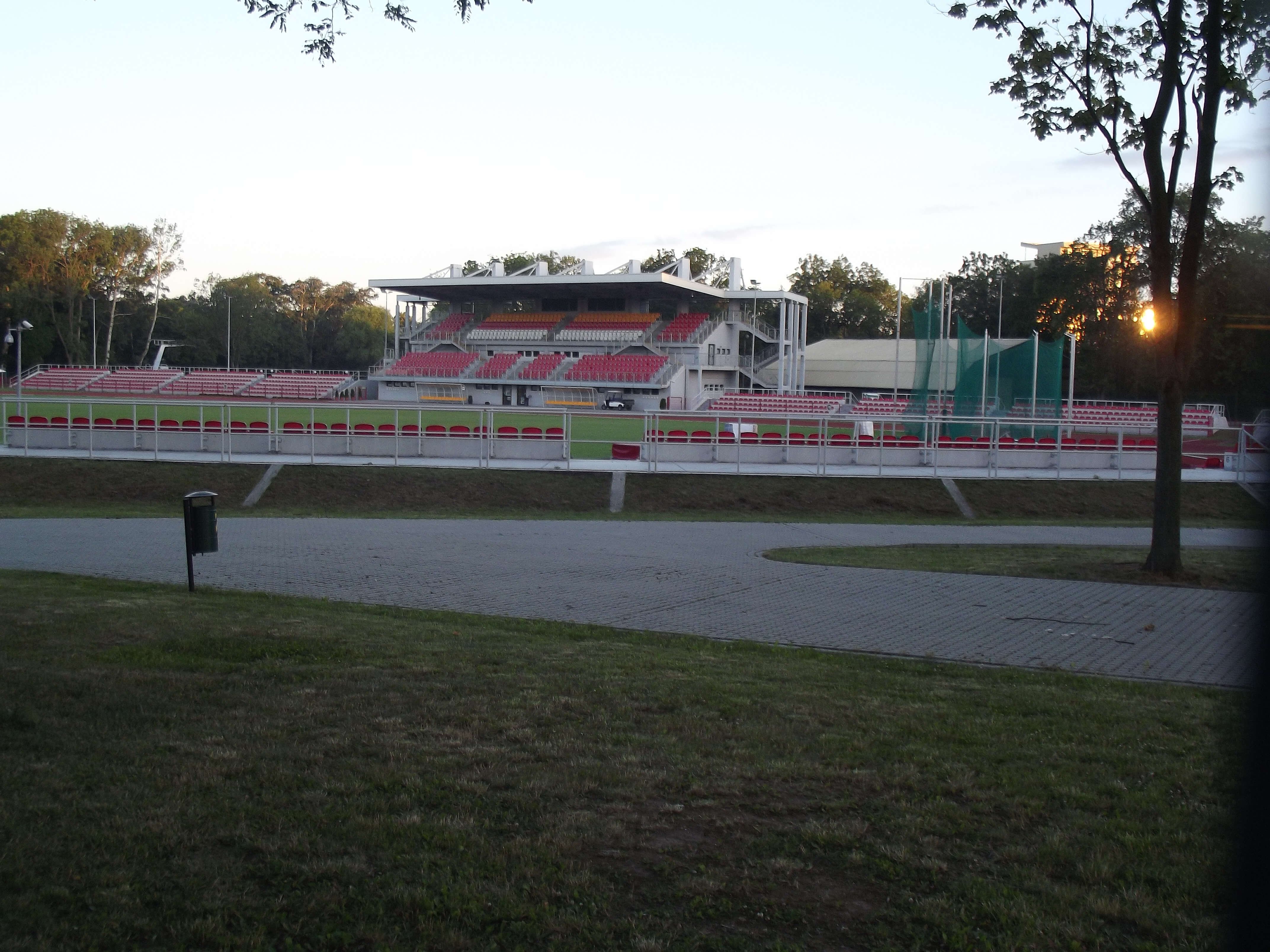 Stadion OSiR Inowrocław